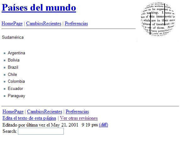 Inicios de la Wikipedia en español. Reconstrucción de la imagen de la página "Países del mundo", como debió haberse visto al momento de su creación, el 21 de mayo de 2001, a las 21:19. Oldest pages of Spanish Wikipedia. IMAGEN CON ANCHO MODIFICADO (para ver la imagen con ancho real ver aquí).